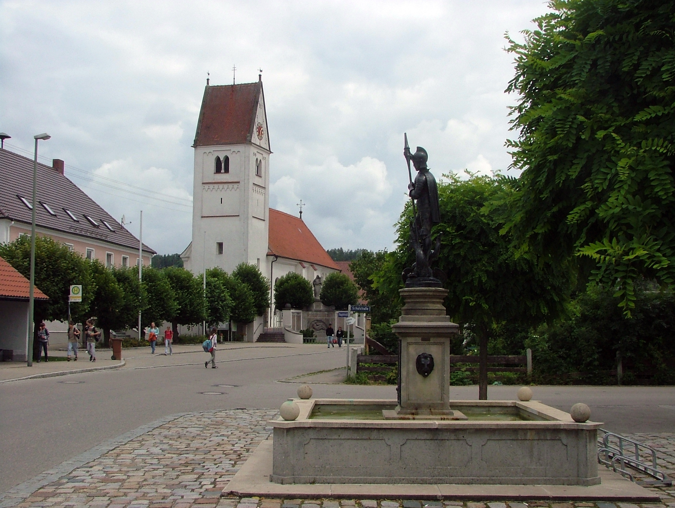 Niederrieden